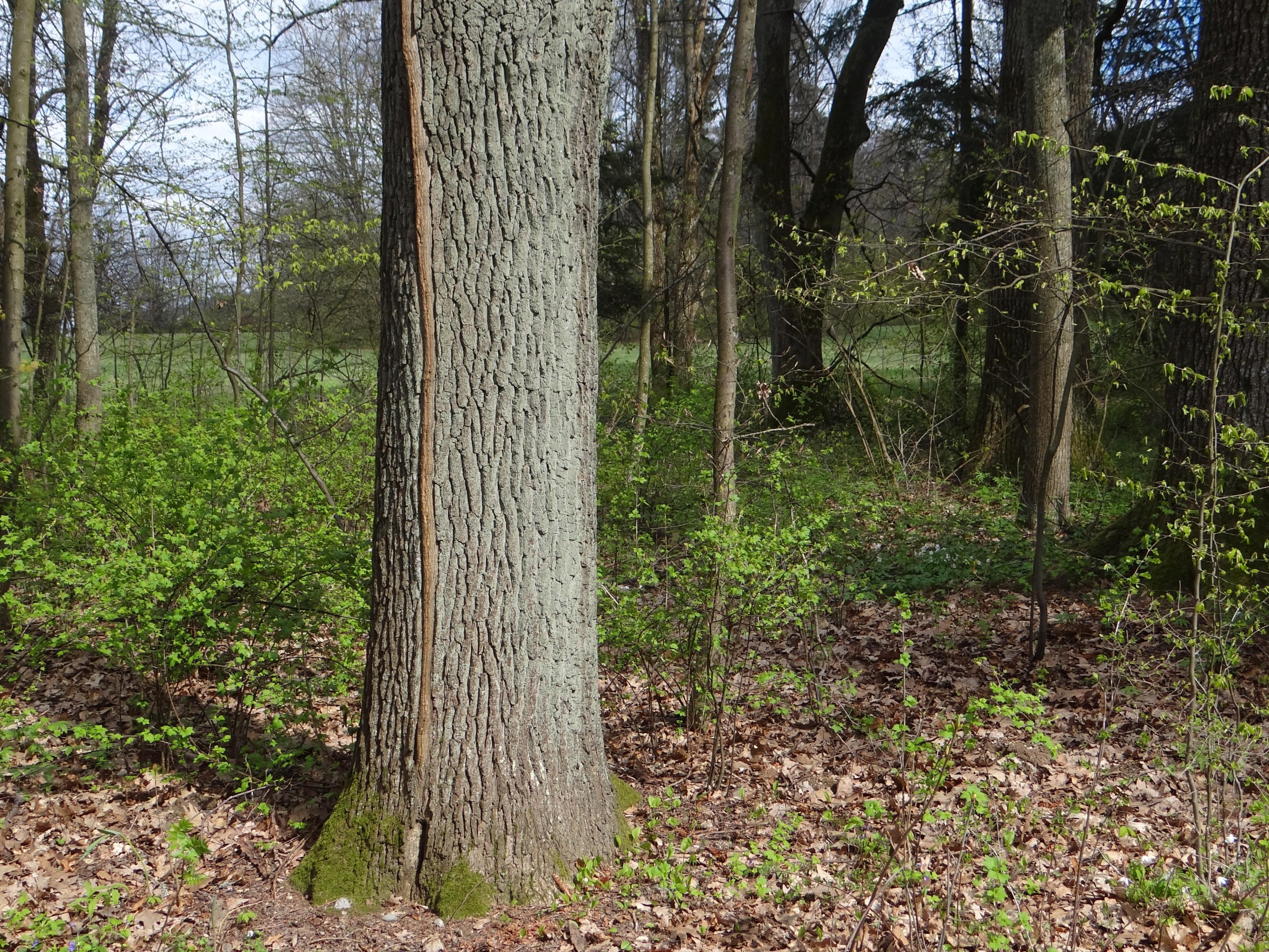 Zabliżniona kallusem listwa mrozowa na pniu